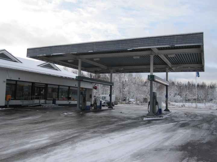 Neste-huoltoasema Pyhäjoen Yppärin kylässä. Huoltoaseman yhteydessä myös Tarmo-lähikauppa.